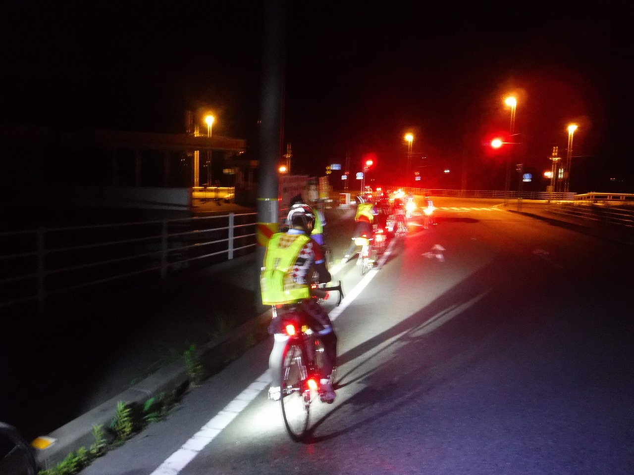 ブルべの夜間走行